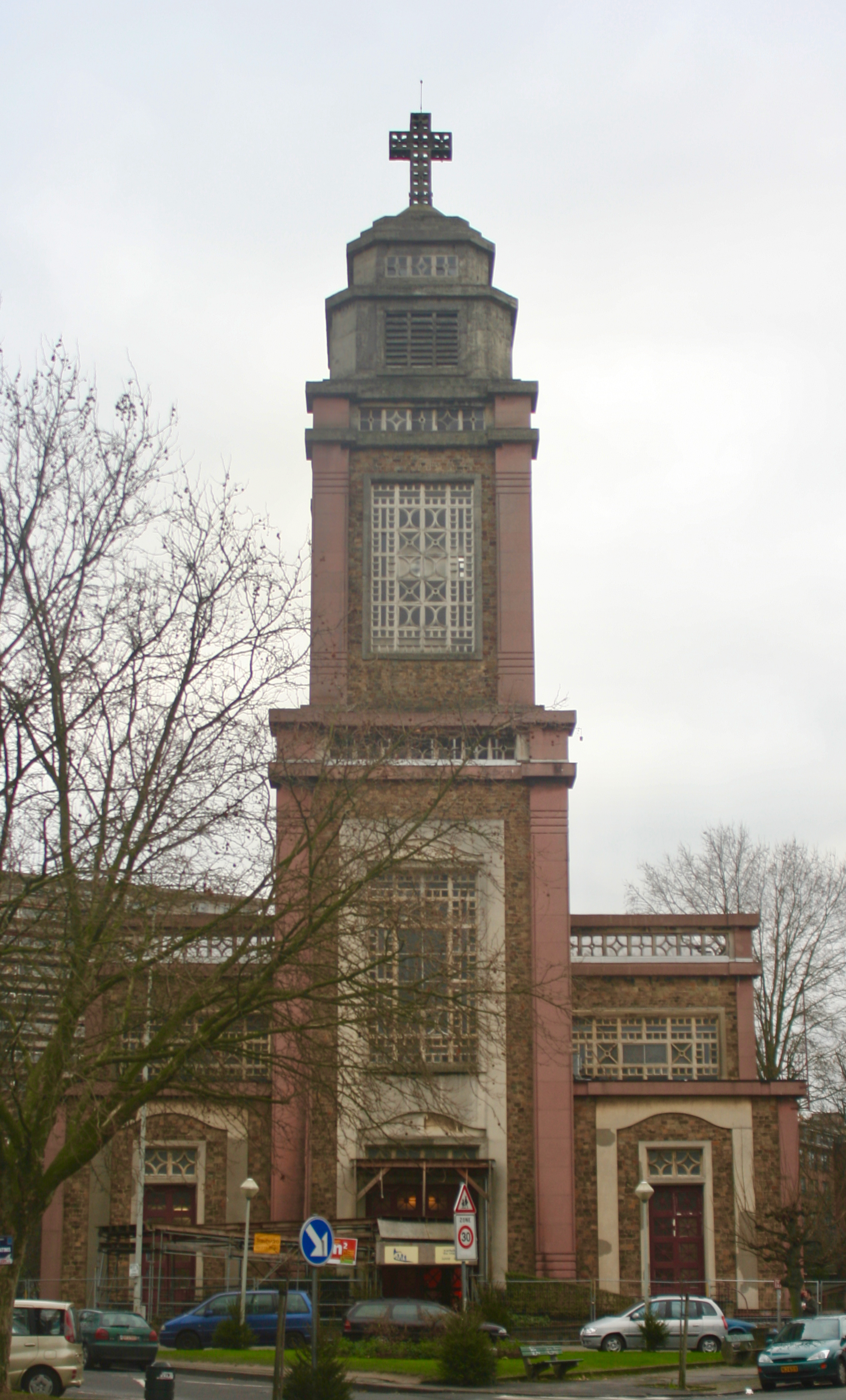 église Sainte-Suzanne à Schaerbeek